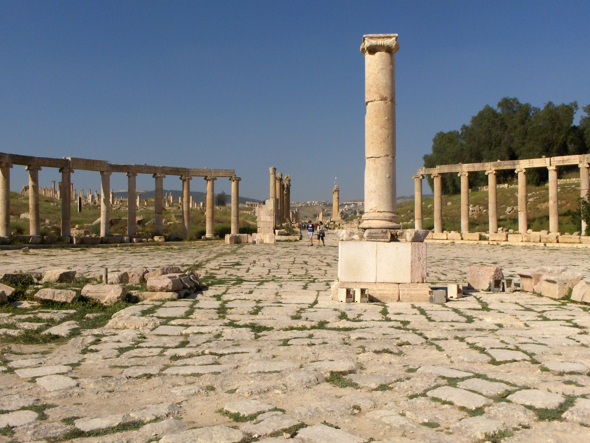 Il foro ovale di Jerash, Giordania